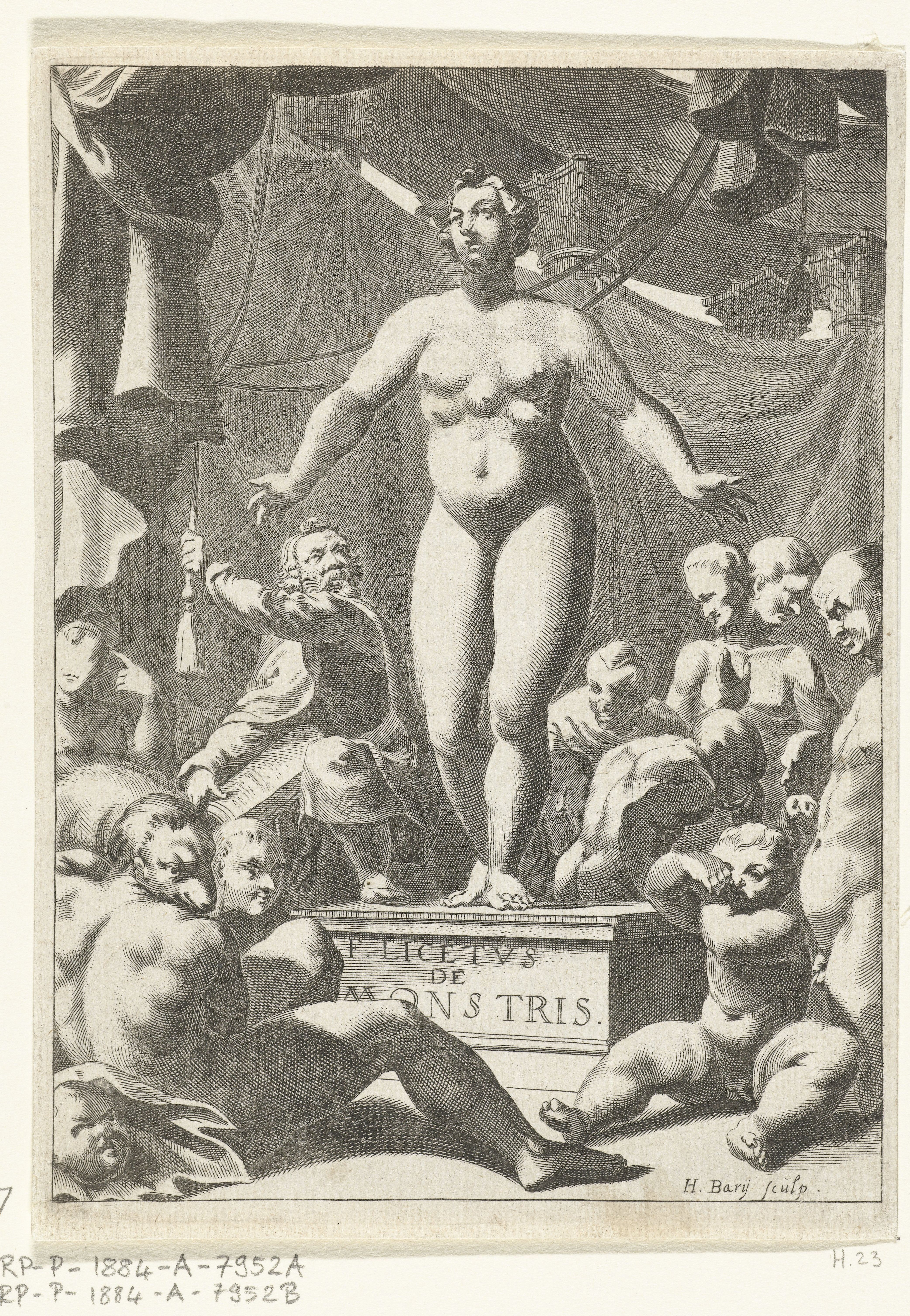 IdentificatieTitel(s): Naakte vrouw met vijf boezemsTitelpagina voor Fortunius Licetus, De Monstris, Amsterdam 1665Objecttype: prent Objectnummer: RP-P-1884-A-7952ACatalogusreferentie: Hollstein Dutch 23Opschriften / Merken: verzamelaarsmerk, verso midden onder, gestempeld: Lugt 2228Omschrijving: Op een voetstuk staat een naakte vrouw met vijf boezems. Om haar heen andere anatomische curiositeiten zoals een mannen met dierenkoppen en een man met twee hoofden. Op de achtergrond trekt een man met een boek een gordijn opzij, om de blik op de vrouw vrij te geven.VervaardigingVervaardiger: prentmaker: Hendrik Bary (vermeld op object)uitgever: Andreas FrisiusPlaats vervaardiging: prentmaker: Nederlanduitgever: AmsterdamDatering: 1665Fysieke kenmerken: gravureMateriaal: papier Techniek: graveren (drukprocedé)Afmetingen: blad: h 182 mm × b 133 mmOnderwerpWat: human monstrosities ~ freak showVerwerving en rechtenVerwerving: aankoop 1884Copyright: Publiek domein